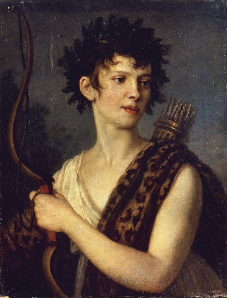 Актриса Евгения Колосова (1782-1869)